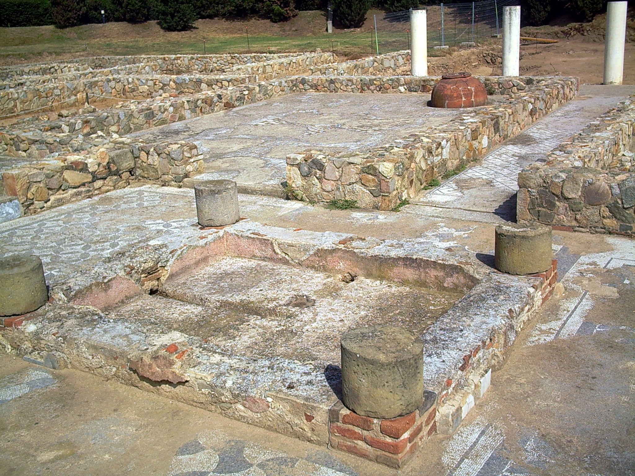 1 - Atrium de la vil·la romana de Can Llauder, amb el Impluvium en primer plà. Al fons a la dreta, el passadís (fauces) que porta al pati enjardinat (hortus). Mataró, el Maresme, (Catalunya).